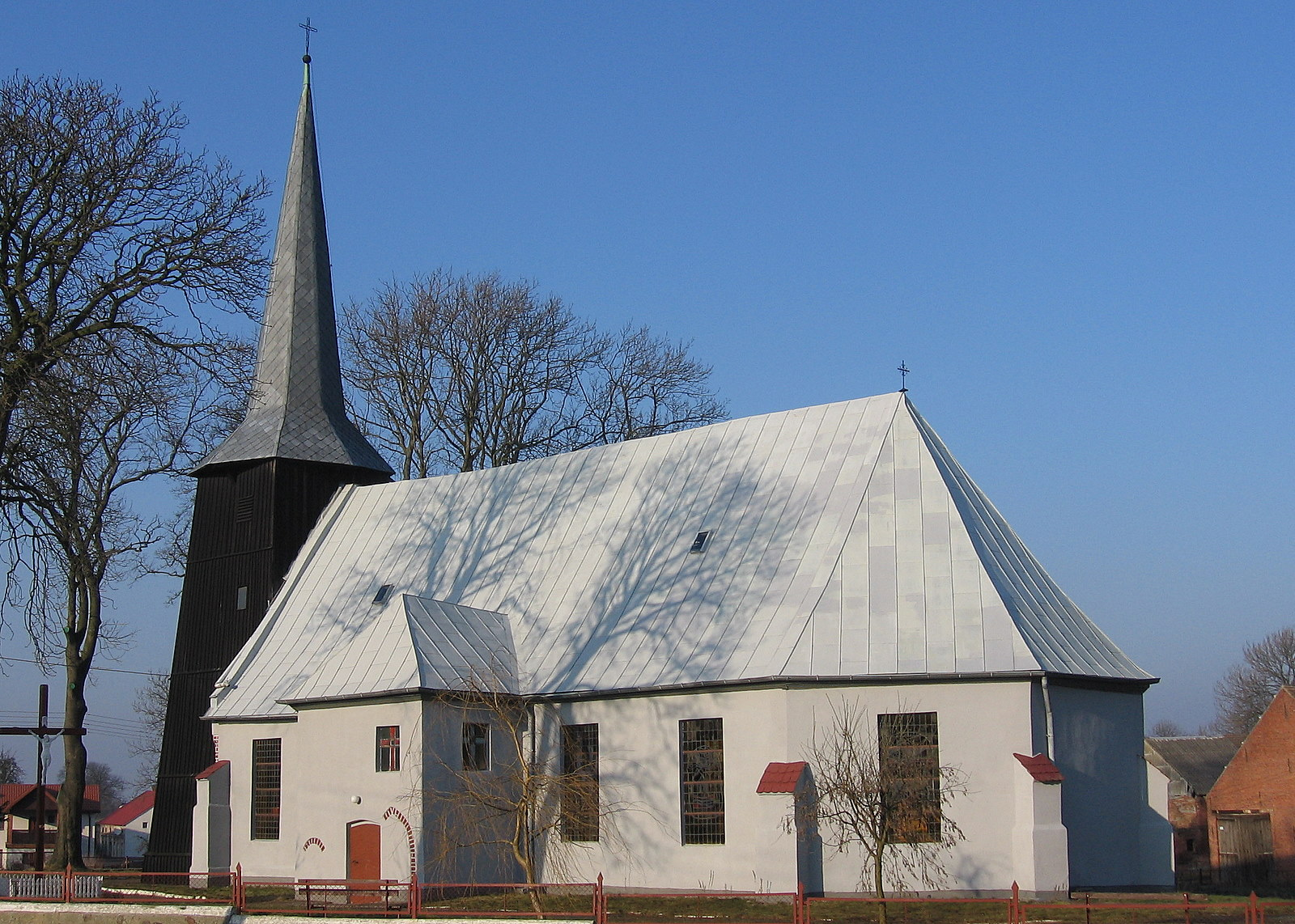 Trzebusz - rzymskokatolicki kościół parafialny p.w. św. Józefa Oblubieńca NMP, XV, XVII